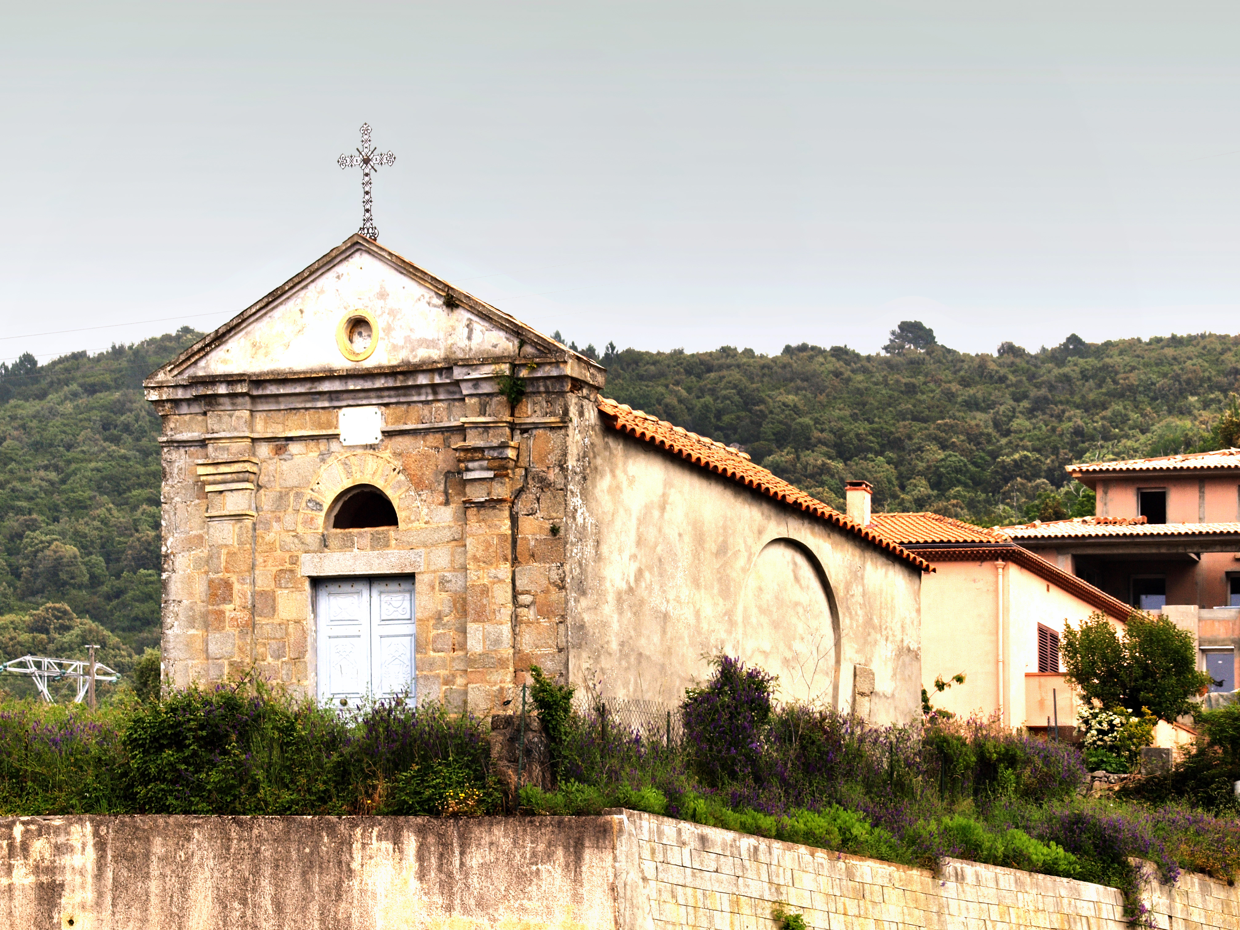 Piana, Ouest Corse (Corse) - Église St-Pierre et Saint-Paul, du XIe siècle, détruite puis rebâtie au XVIIe, devenue chapelle funéraire en fin XIXe.